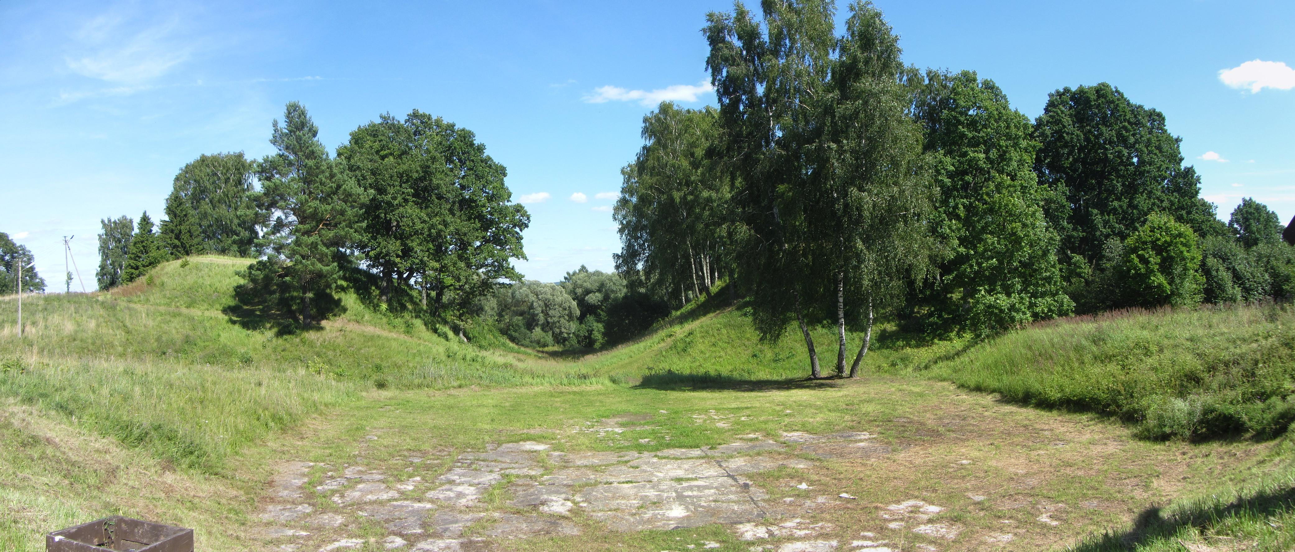 Narkūnai, Lithuania